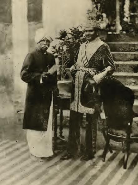 Raja Jagavira Rama Ettappa Nayakar Bahadur of Ettaiyapuram with his Diwan, K. Jagannadha Chettiar